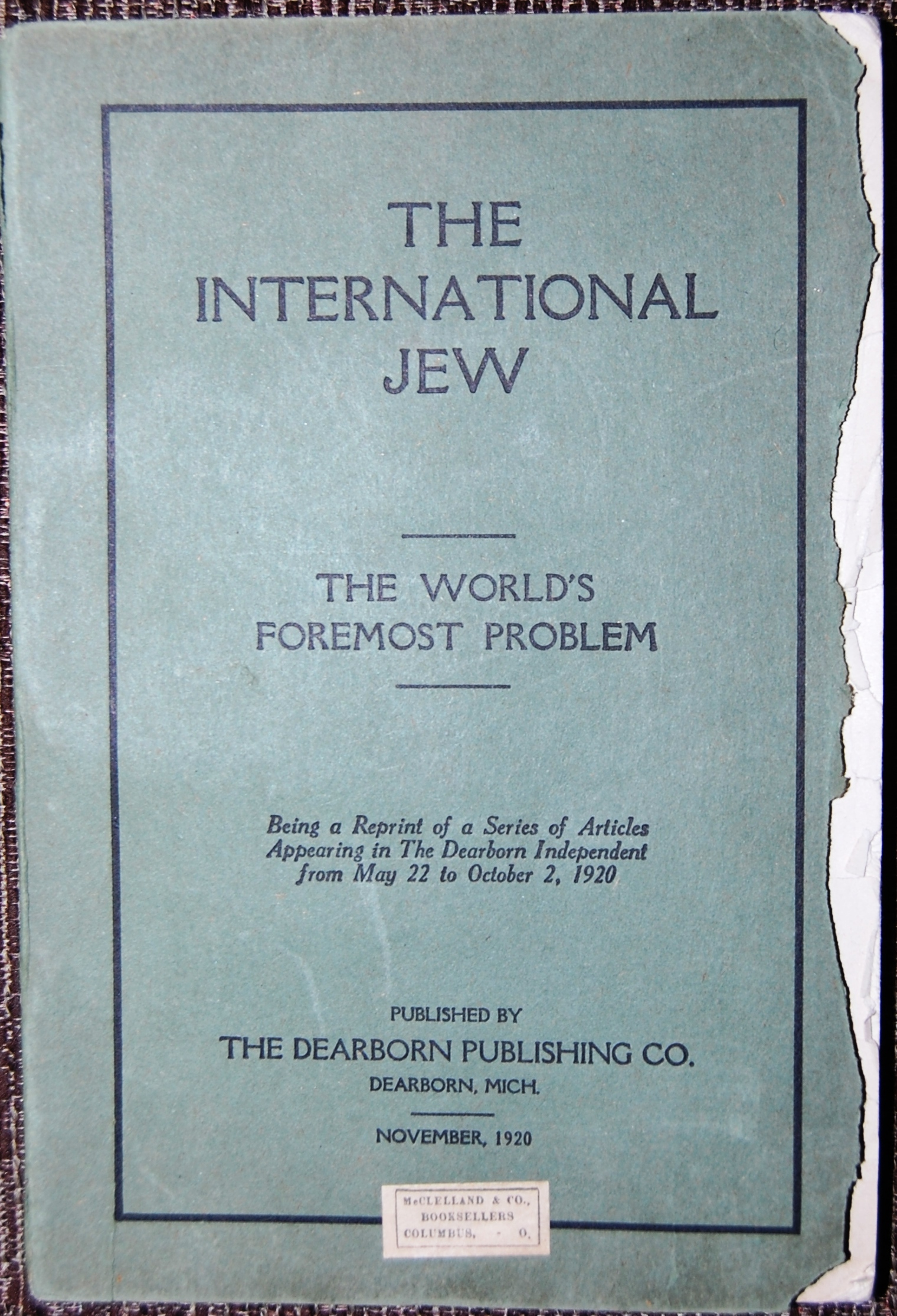 The International Jew, Nov. 1920 - 1st Edition by Henry Ford